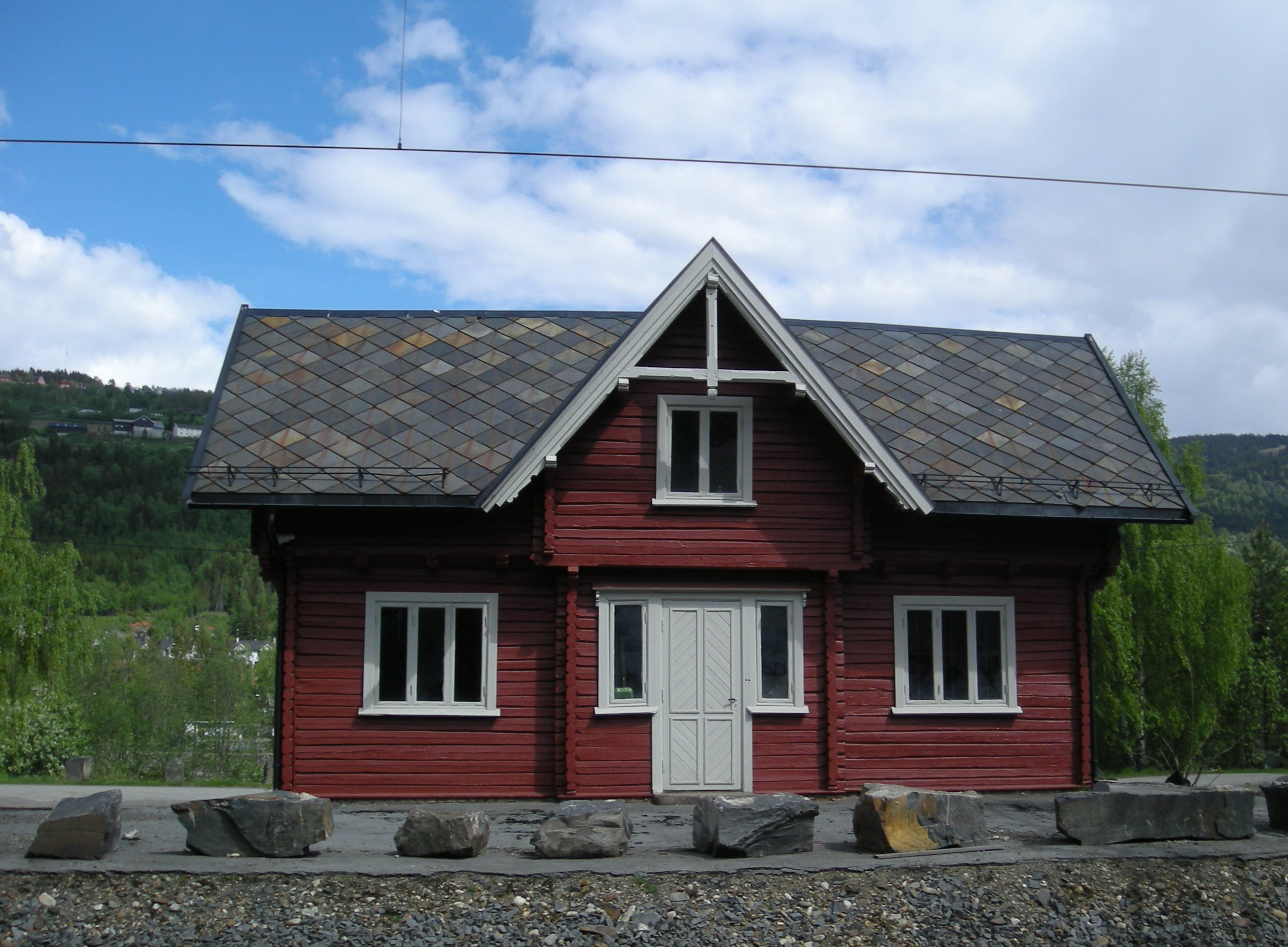 Ilgodshus ved Øyer stasjon